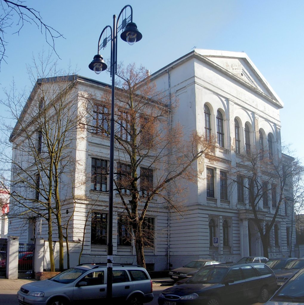 Zespół Szkół Plastycznych w Bydgoszczy